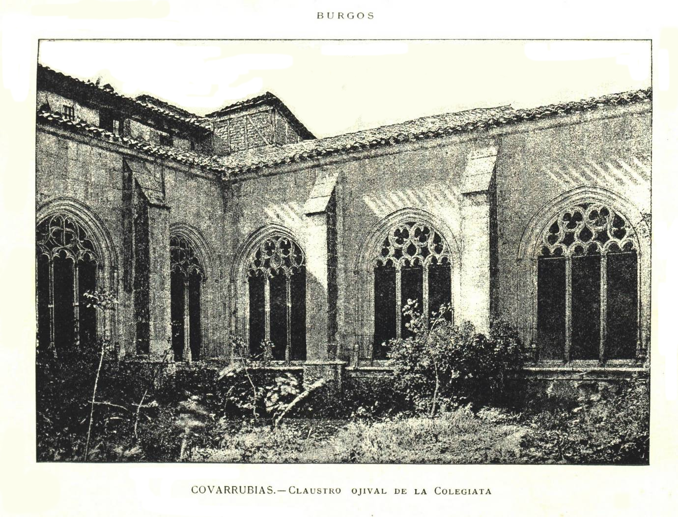 "Claustro ojival de la Colegiata" de Covarrubias (Burgos - España). Dibujo de Miguel Joarizti, heliografía de 11 x 16 cm, en hoja de 16 x 24 cm. Publicado en Barcelona: Establecimiento Tipográfico-Editorial de Daniel Cortezo y Cía; 1887.